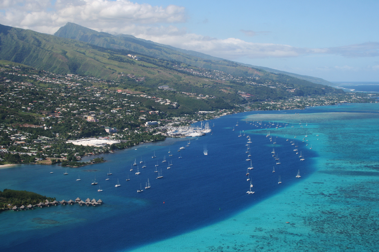 Marina Taina à Papeete Marina Taina